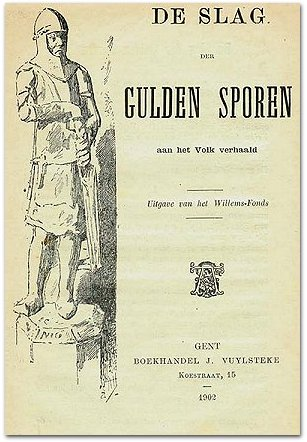 De slag der Gulden Sporen aan het Volk verhaald, uitgave van het Willemsfonds, Gent, 1902